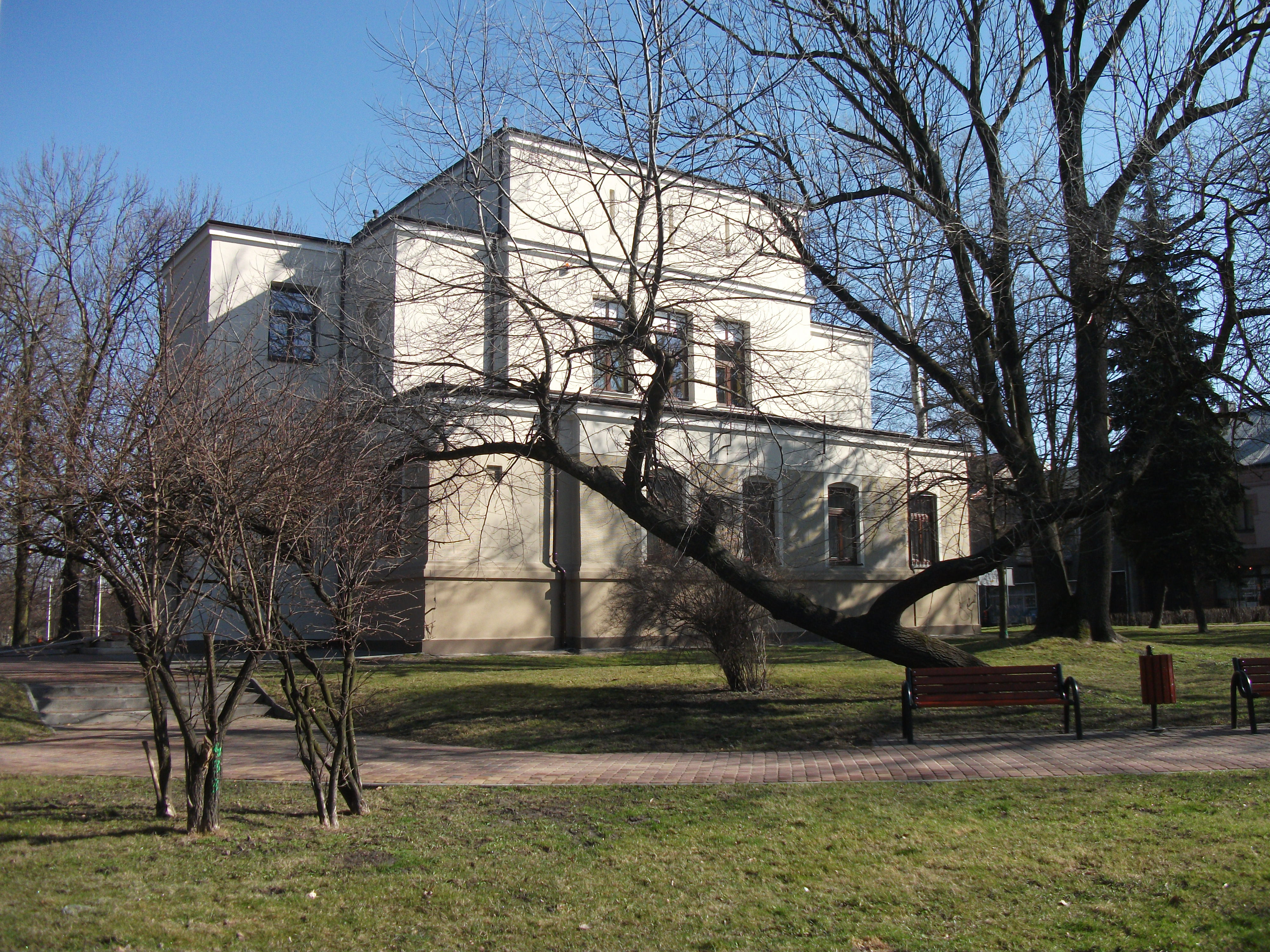 Była cerkiew NMP, obecnie siedziba Wieluńskiego Domu Kultury